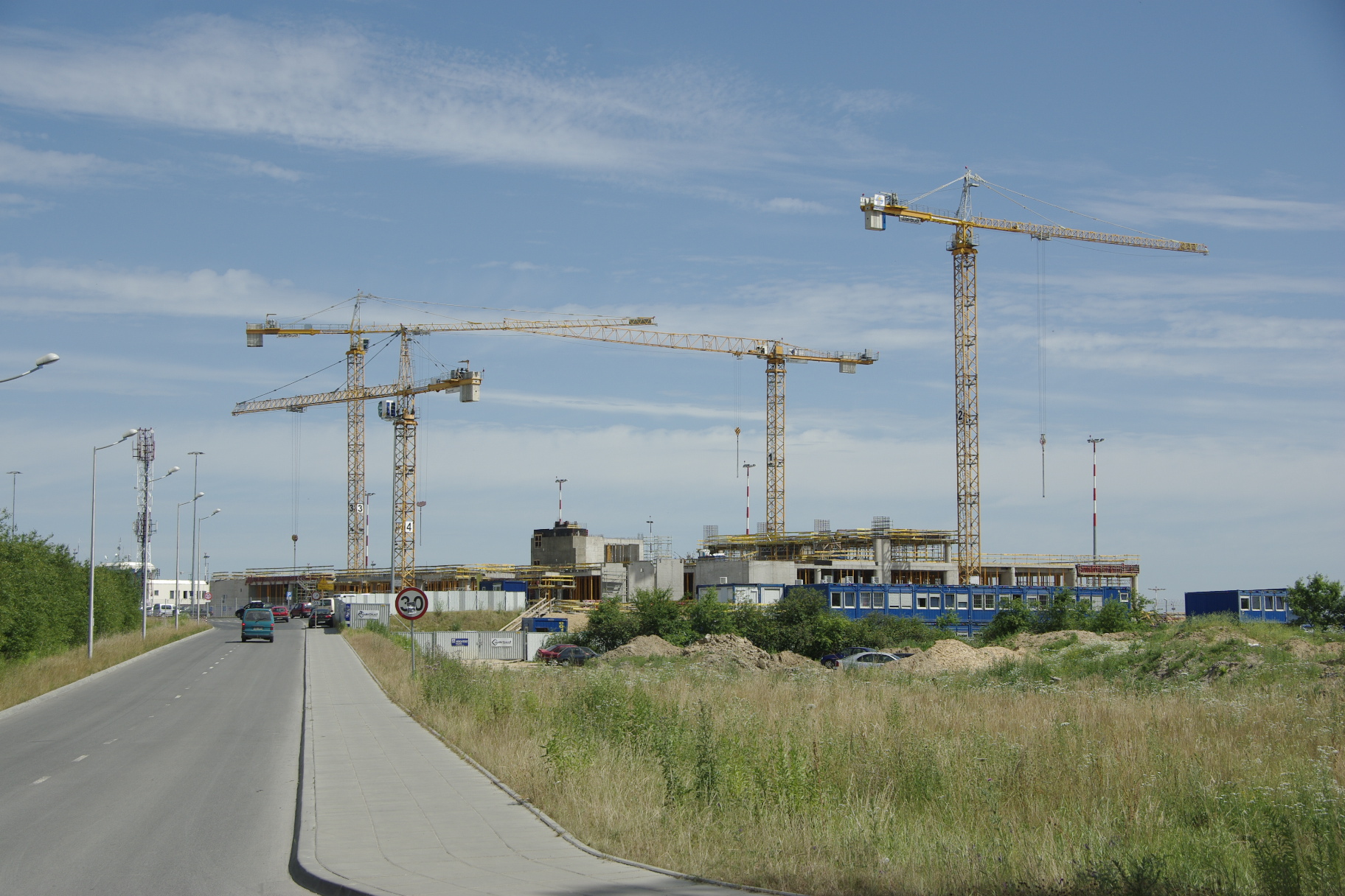 Łódź airport terminal III